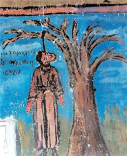 Обесването на Юда от църквата „Свети Николай“ в Страища, Егейска Македония, Гърция.